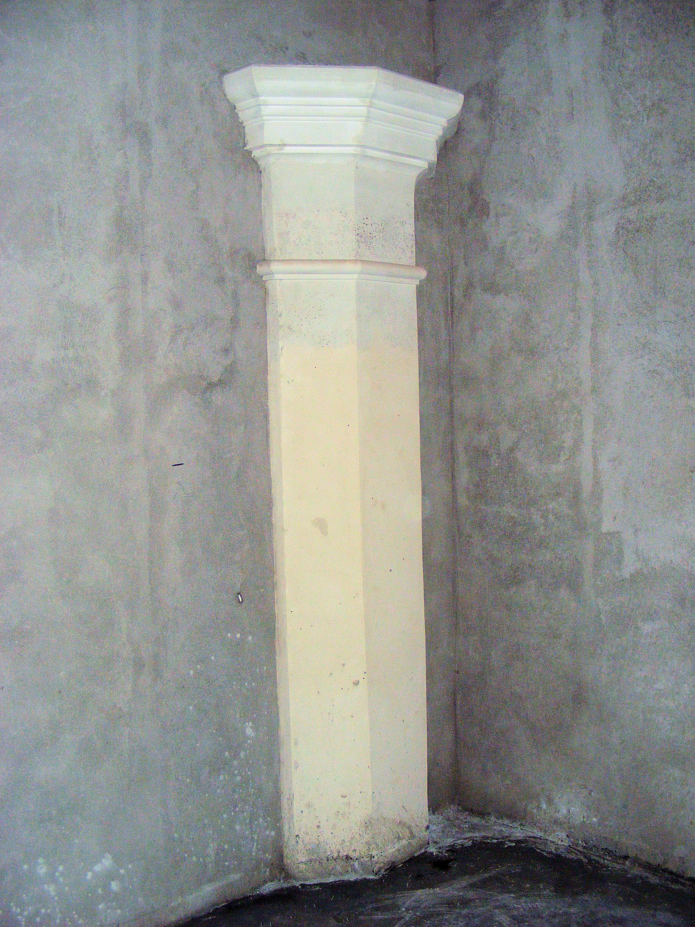 Wnętrze synagogi w Międzyrzeczu Filar